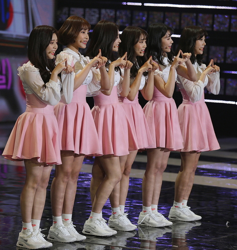 다이아(DIA) 평창 동계올림픽 G-10 특집 생방송